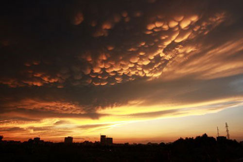 Mây vảy rồng xuất hiện ở Hà Nội, 20/8/2009.